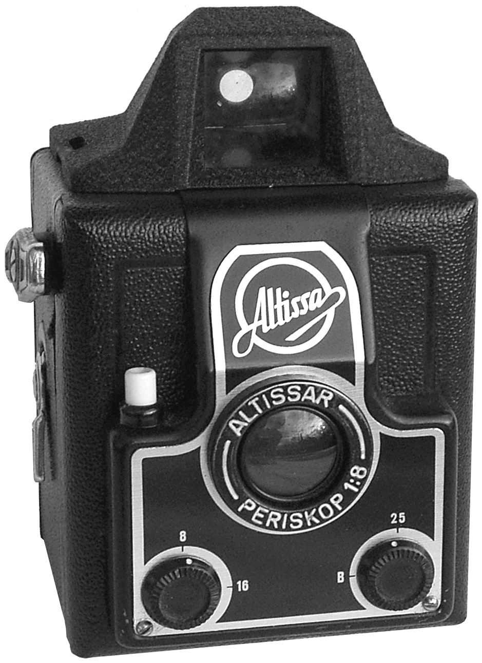 Die Altissa-Box für das Format 6x6 cm war die Fortsetzung eines Vorkriegsmodells – mit geringfügigen Änderungen. Dieses neue Modell kam 1951 auf den Markt. Hersteller war das "Altissa-Camera-Werk“ in Dresden, das 1952 verstaatlicht wurde. Vom Altissa Werk stammt auch die berühmte Altix. Von anderen Boxen unterscheidet sie sich durch die gefällige, handliche Form (sie ist kleiner, als sie auf dem Bild wirkt) und durch das Objektiv. Während die meisten Boxen mit einem Einlinser (Meniskus) ausgerüstet waren, hatte die Altissa ein Periskop. Das ist eine Konstruktion von zwei sich symmetrisch gegenüberstehenden Einzellinsen mit Blende und Verschluss dazwischen. Das gibt schon merklich schärfere Bilder. Zwei (Loch-)blenden waren einstellbar: 8 und 16. Die Verschlusszeit beschränkt sich auf 1/25 sec und B. Am Auslöser konnte man sogar einen Drahtauslöser einschrauben und am Boden war ein Stativgewinde eingelassen. Auf der Rückseite war das Qualitäts-Gütesiegel „[1] 37/361/4002“ eingeprägt, ebenso „Made in Germany“.